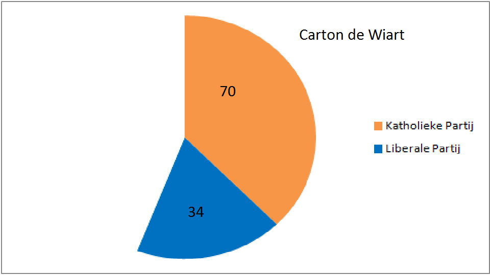 Zetelverdeling van Carton de Wiart na vertrek van socialisten